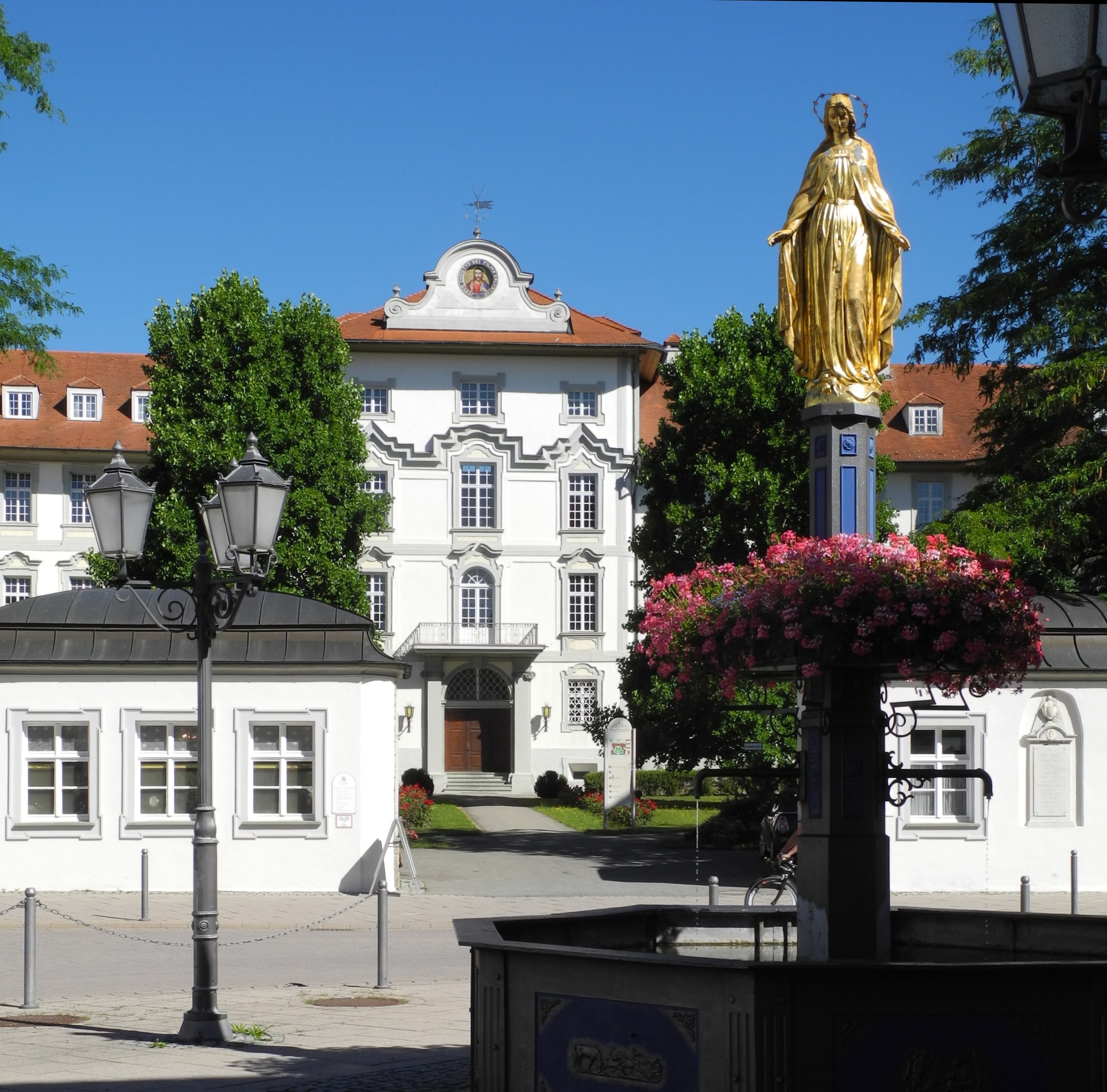 Bad Wurzach - Schloss mit Stadtbrunnen